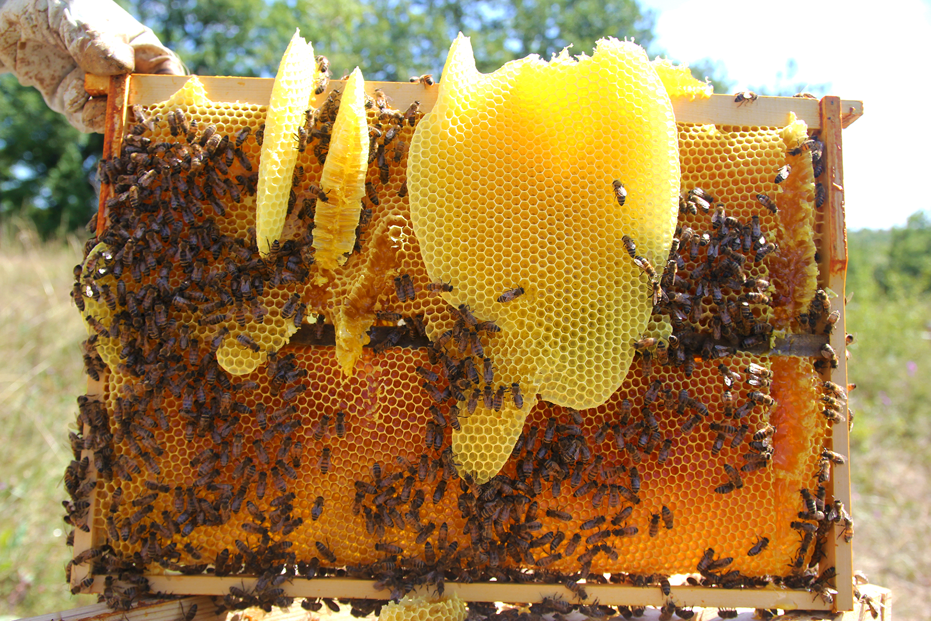 Cire d'abeille sur un cadre de corps de ruche.